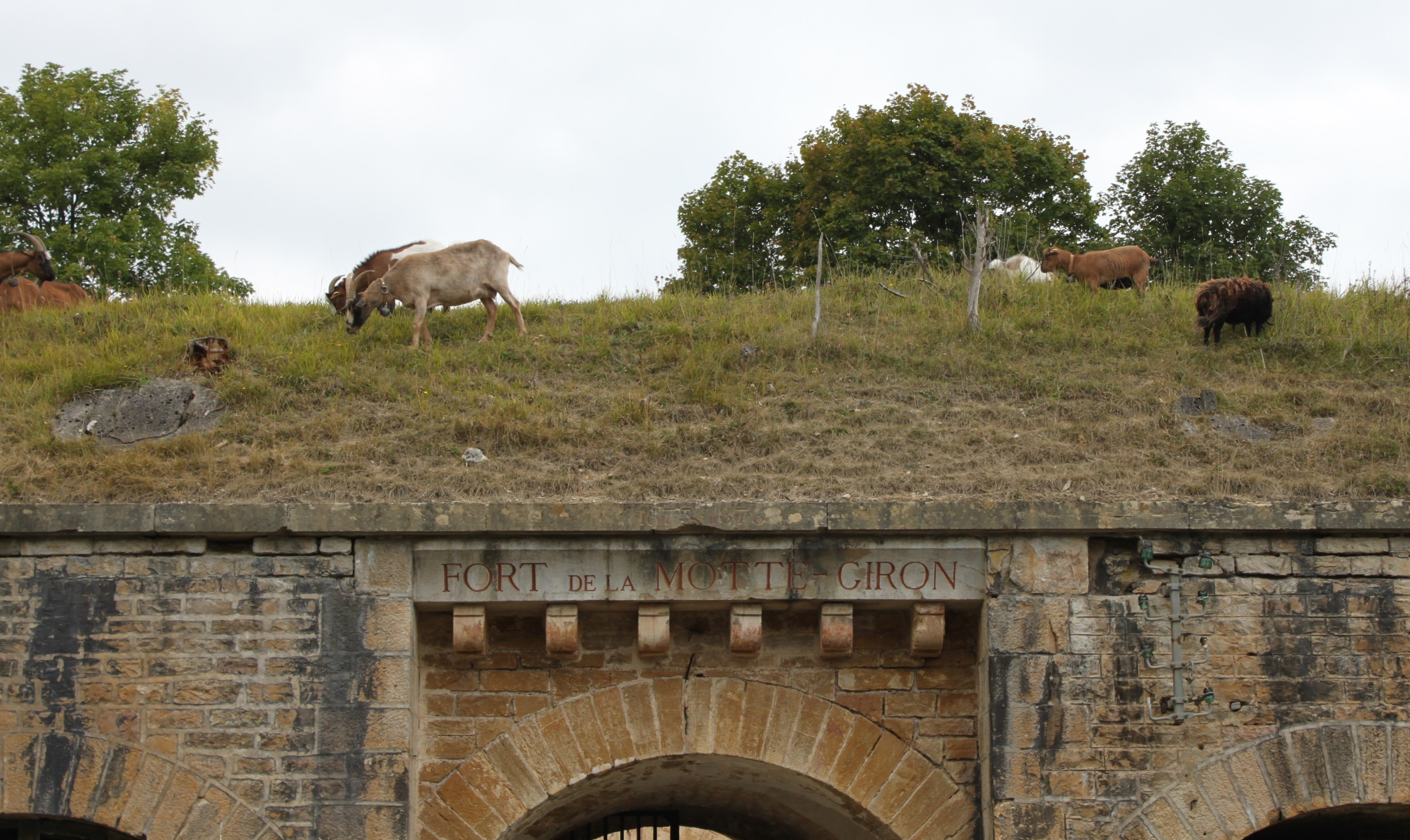 Fort de la Motte-Giron, Dijon, Côte-d'Or, Bourgogne, France